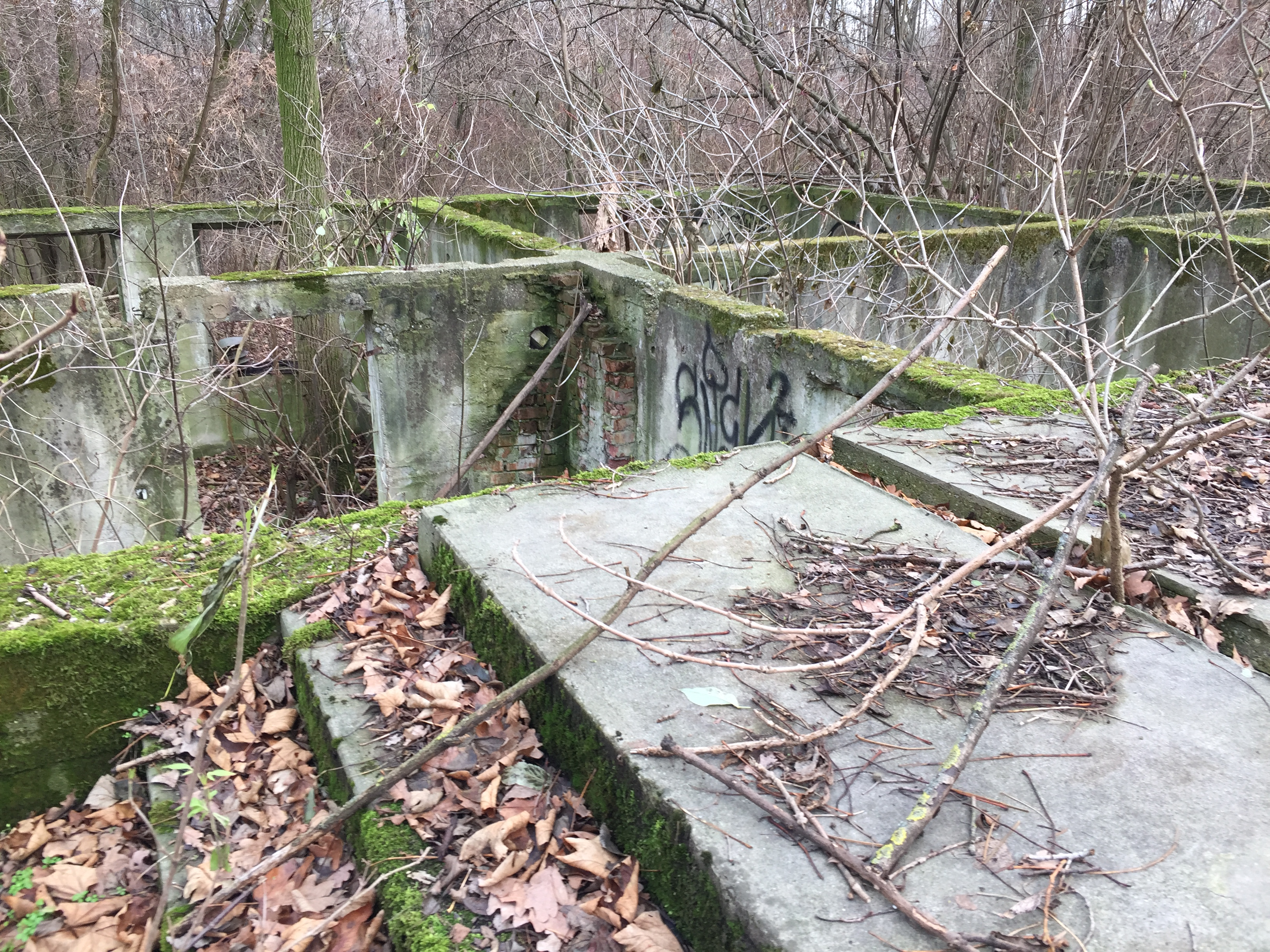 Kellerunterbau eines ehemaligen Gebäude der Verwaltung